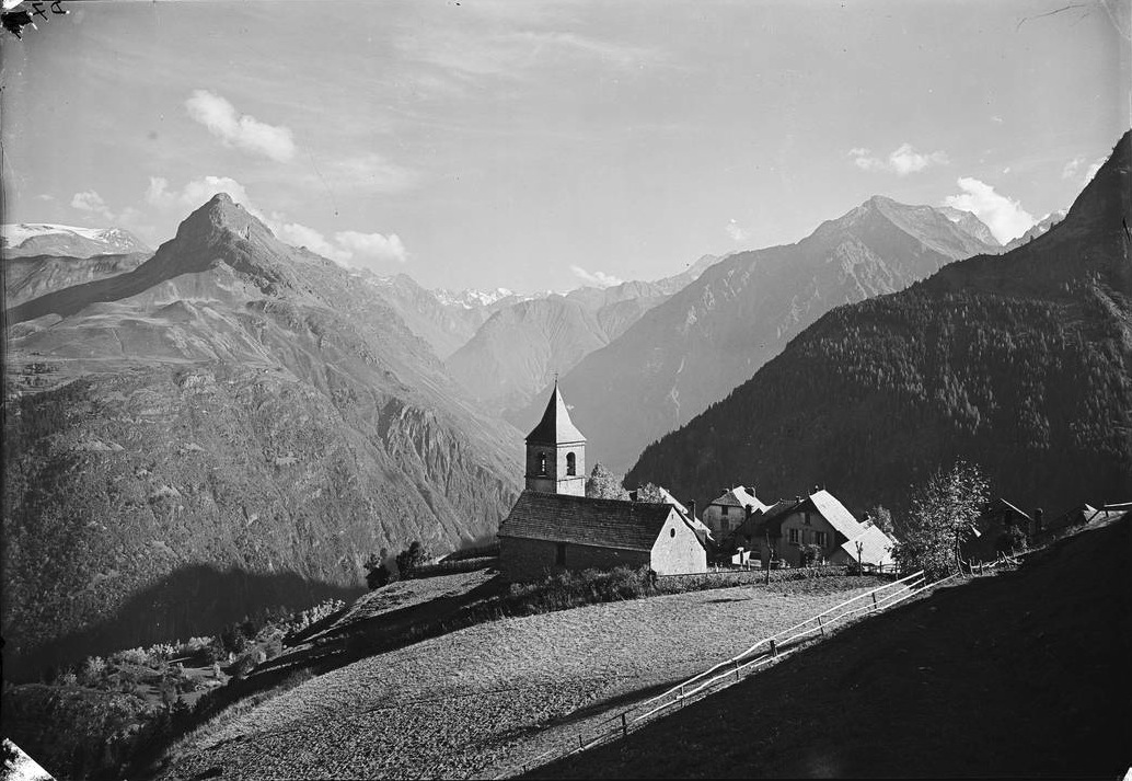 Église de Villard-Reymond au début du XX siècle. Villard-Reymond, Isère, Rhône-Alpes, France.